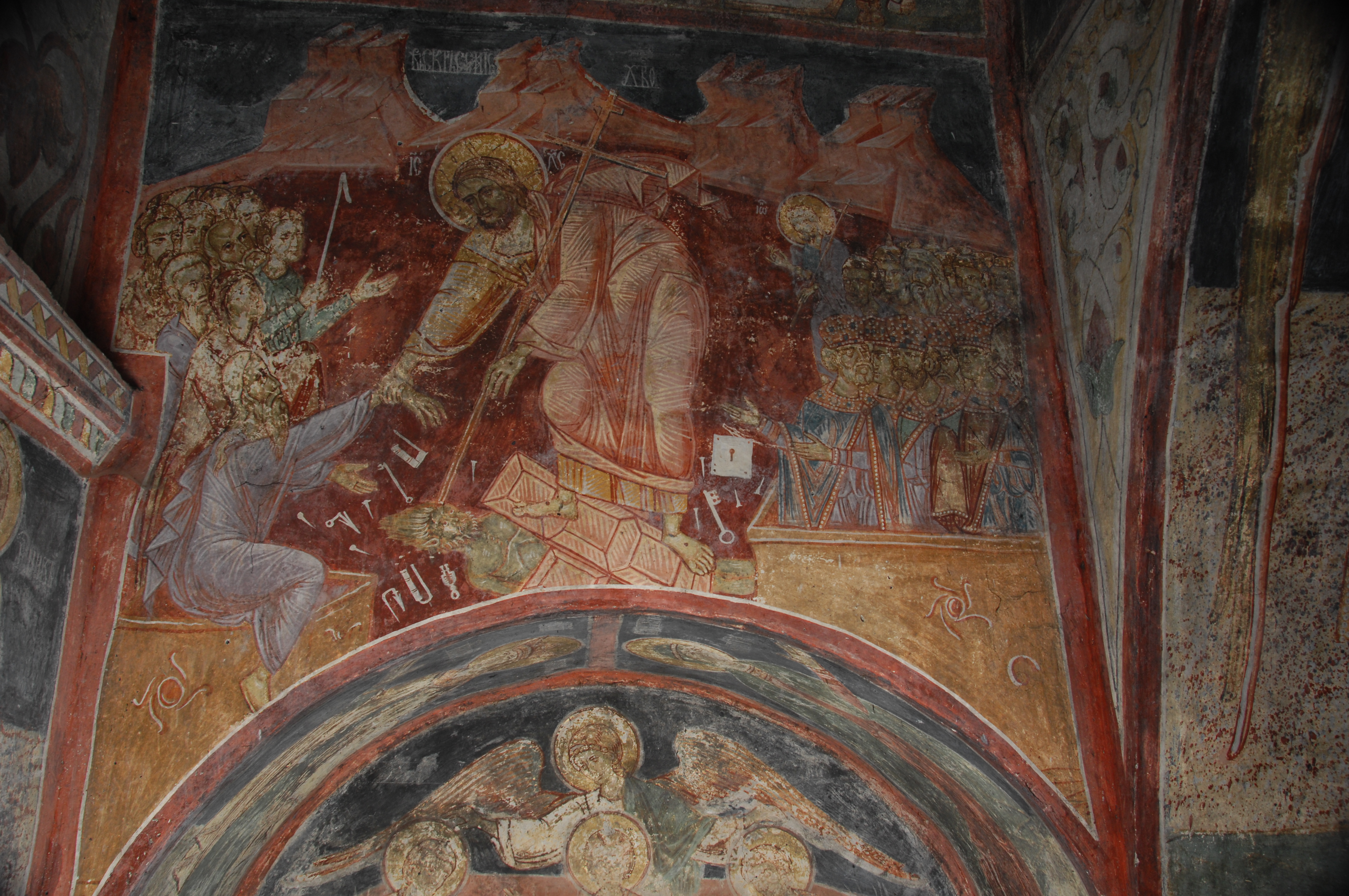 Фреске у олтару цркве у Јежевици